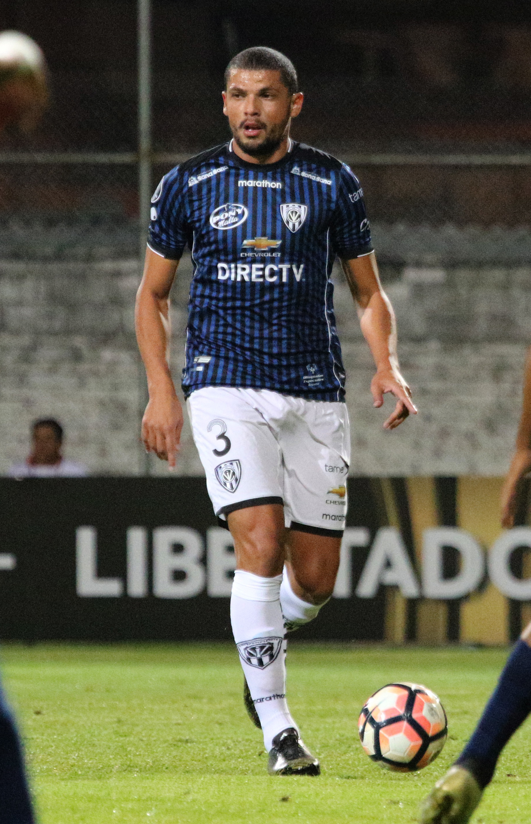 IDV vs MUNICIPAL